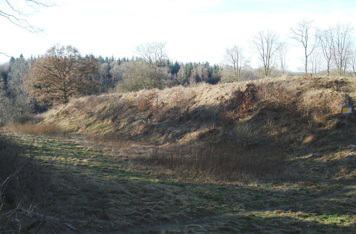 Burgwall Süd des Blocksbergs in Ratekau